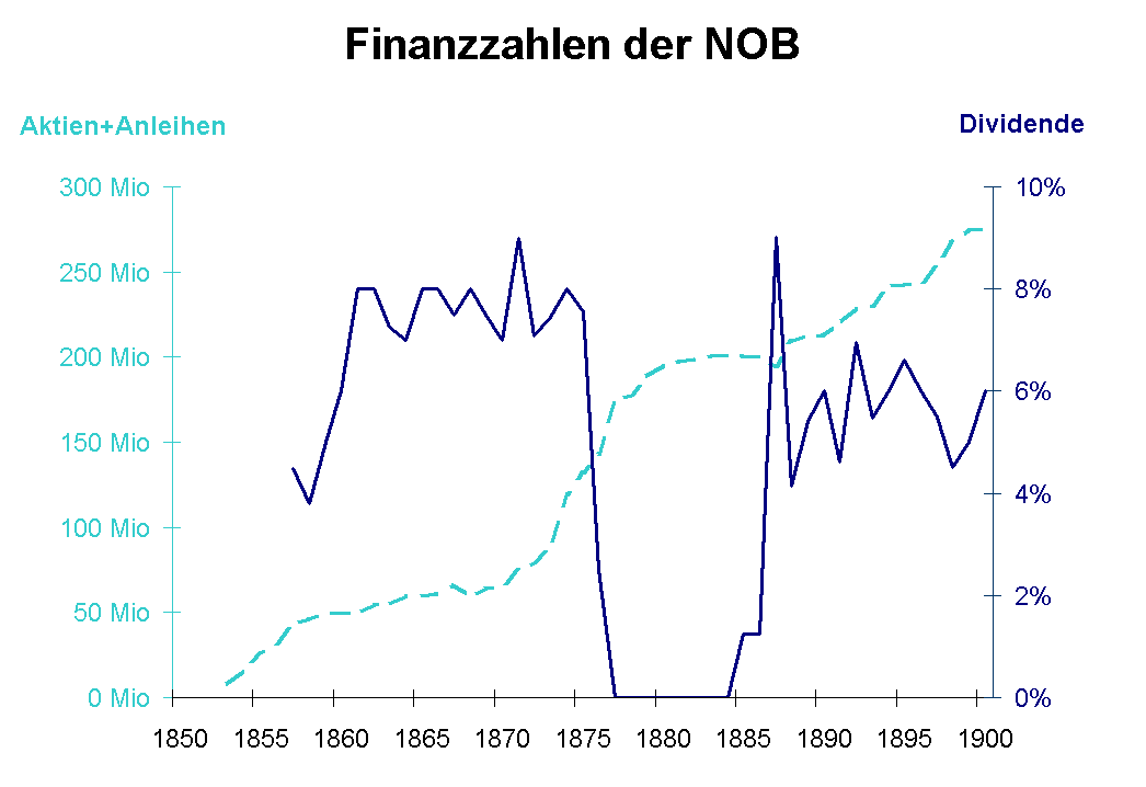 Aktienkapital und feste Anleihen sowie Dividende Aktien sind Anteile am Grundkapital des als Aktiengesellschaft konstituierten Bahnunternehmens. Sie sind hier im Nennwert angegeben, der jedoch in keiner Weise dem Kurswert entsprechen muss. Viele Bahnen haben im Laufe der Zeit ihr Aktienkapital erhöht, was gewöhnlich auf eine Expansion der Bahn hindeutet. Eine Verminderung des Aktienkapitals wurde bei finanziellen Schwierigkeiten vorgenommen, indem durch Herabsetzung des Nennwerts der Aktien Kapital für das Unternehmen freigesetzt wurde (sogenannter Kapitalschnitt). Feste Anleihen waren neben Aktien die wichtigste Form der Geldbeschaffung für die Bahnen. Das vom Unternehmen aufgenommene Kapital wird über eine bestimmte Laufzeit zu einem bestimmten Zinssatz verzinst. Die Zinslast für Anleihen war ein gewichtiger Ausgabeposten insbesondere der grossen Bahnen. Wenn wegen zu geringen Erträgen die Zinsen nicht mehr bezahlt werden können, droht der Konkurs. Die Dividendenauszahlungen für die Aktionäre sind hier im Verhältnis zum Nennwert der Aktien angegeben.